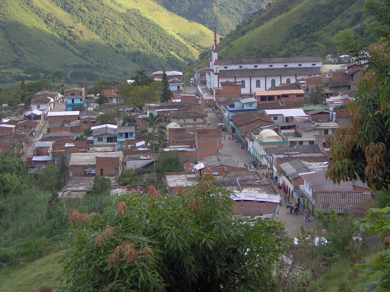 Panorámica del Corregimiento de San Diego, Liborina